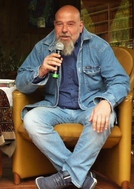 Ireneusz Grin na Festiwalu Góry Literatury w Krajanowie.